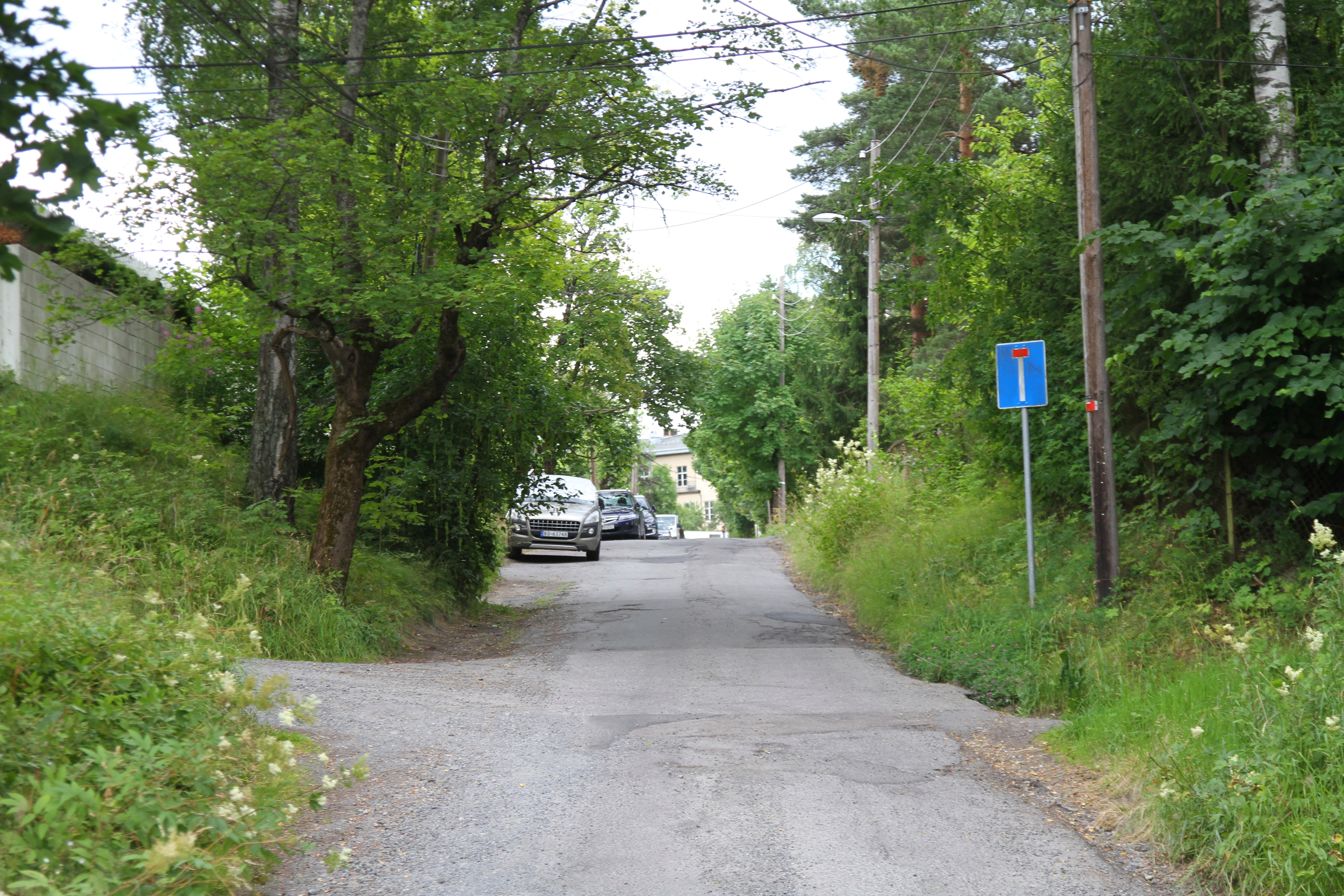 Lønneveien i Oslo.